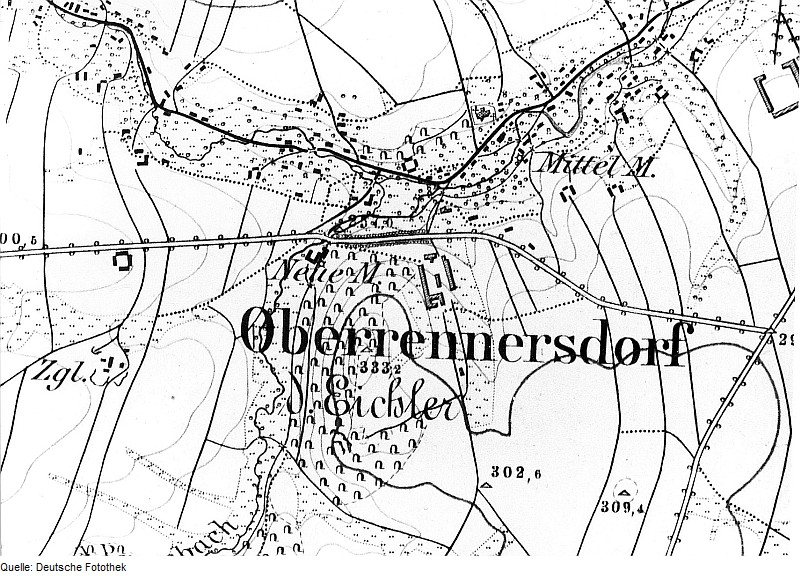 Original image description from the Deutsche Fotothek Berthelsdorf-Rennersdorf. Meßtischblatt, Sekt. Löbau, 1884